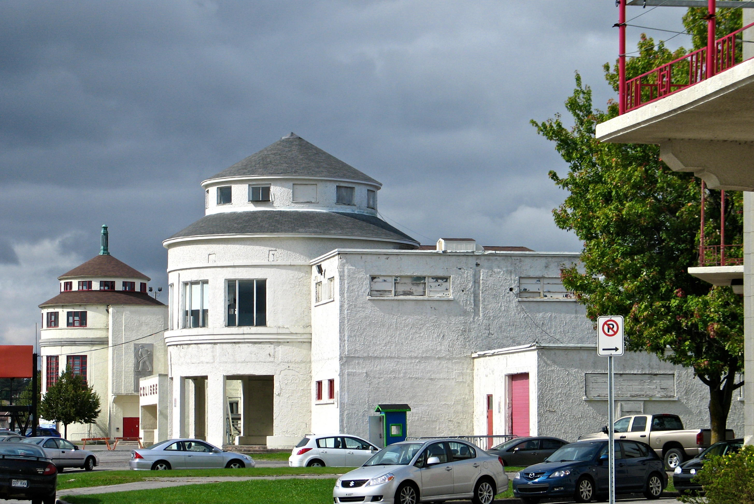 Exposition Agricole de Trois-Rivières